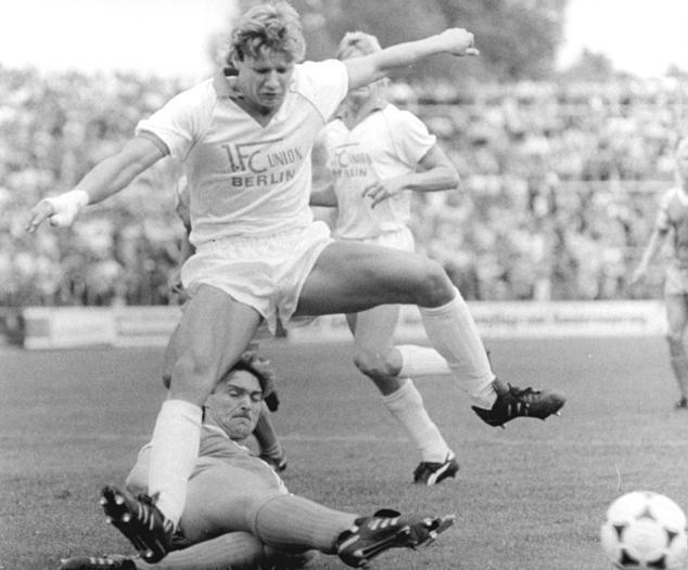 ADN-ZB-Grimm-20.8.88-pra-Berlin: Fußball-Oberliga- 1.FC Union Berlin - Sachsenring Zwickau 2:0- Nur im letzten Augenblick konnte Andreas Mittag (am Boden liegend, Sachsenring Zwickau) den Schuß aufs Tor von Rene Unglaube (1. FC Union Berlin) verhindern.